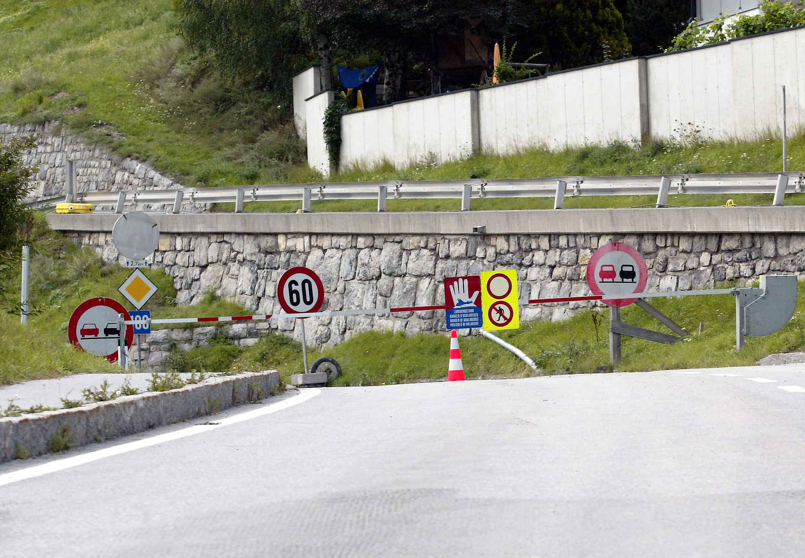 Sperre der Straße ins Paznaun aufgrund der Hochwasserkatastrophe